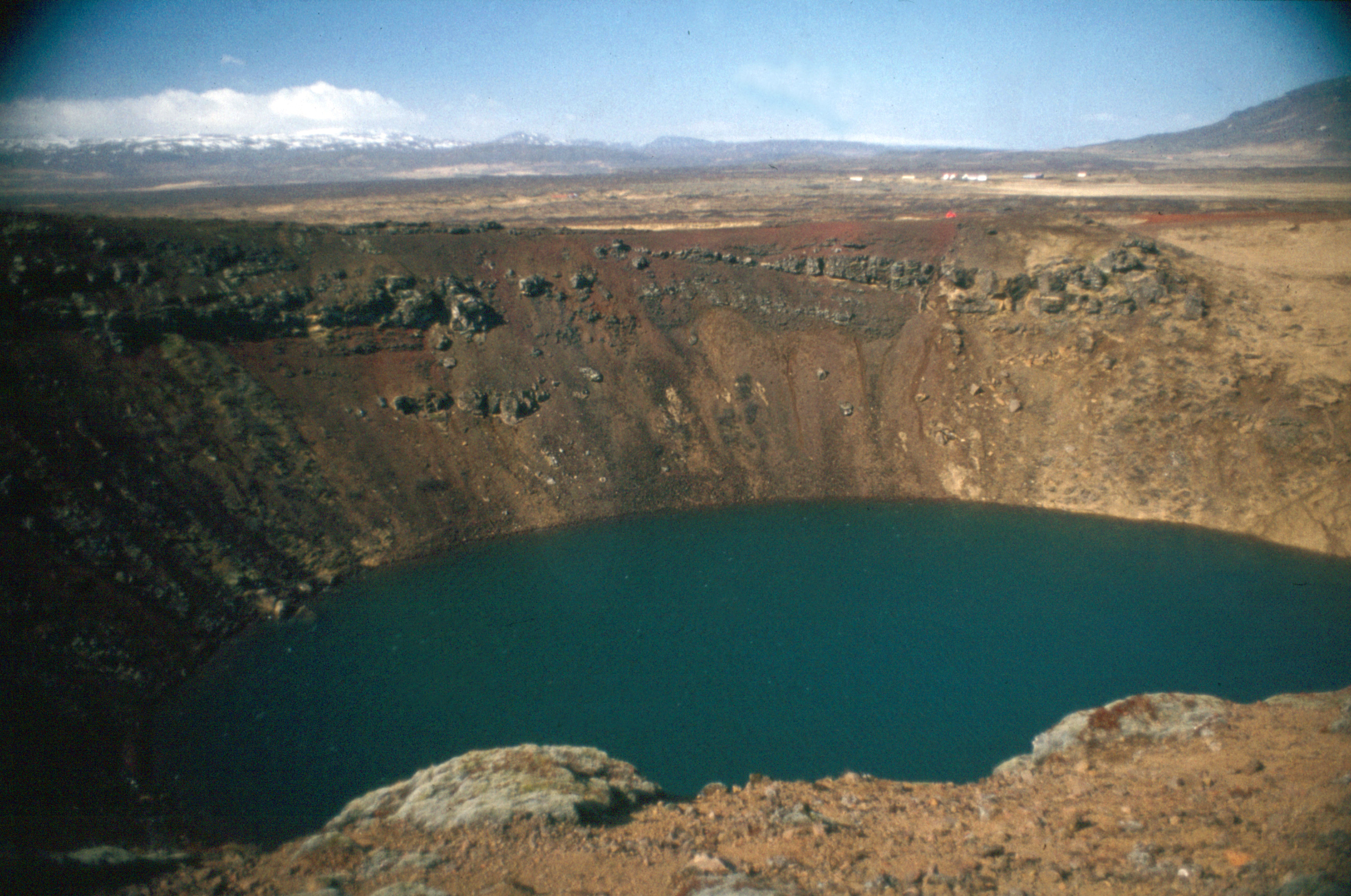 Kerid-Krater in Island